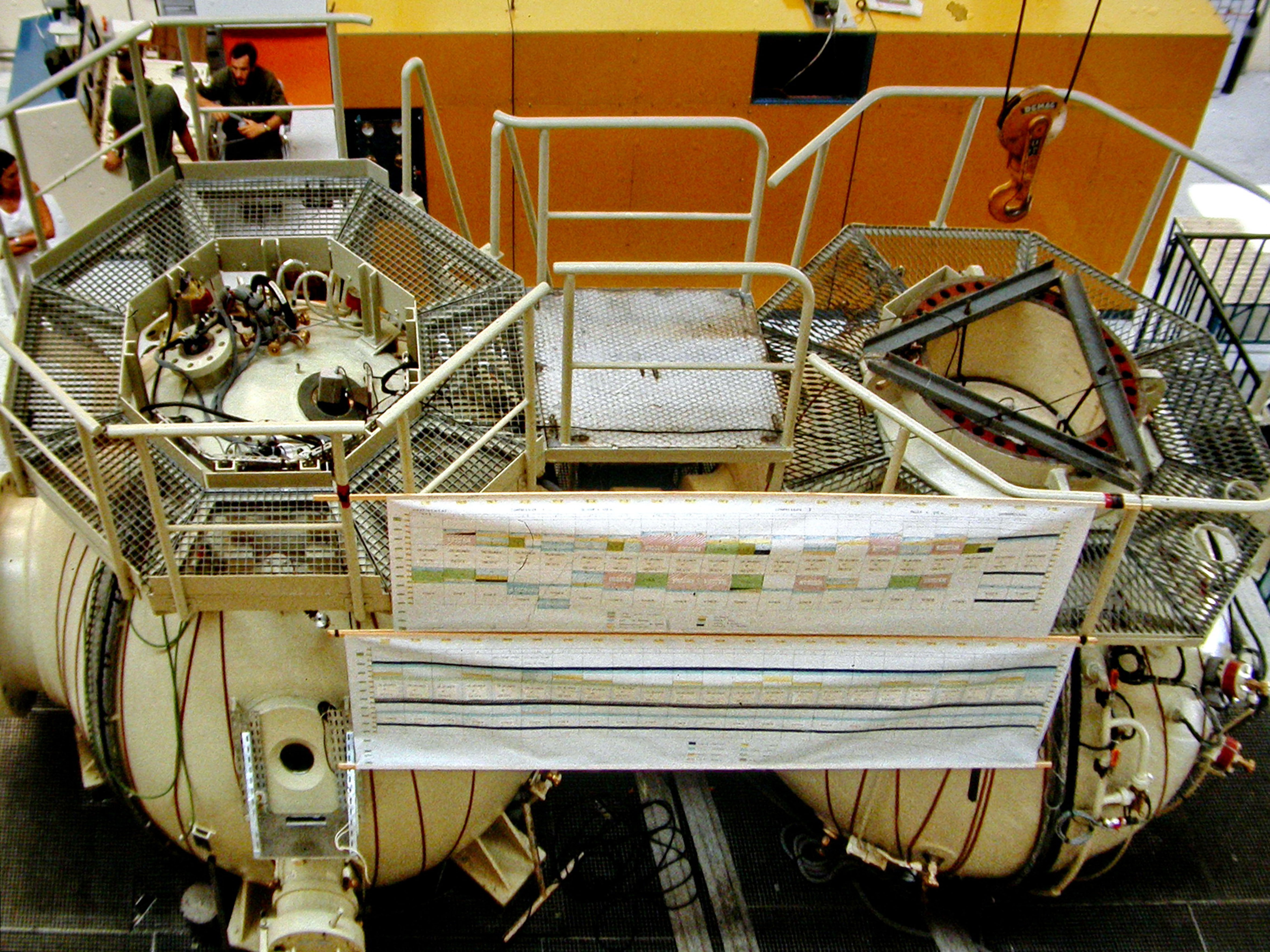 Caisson de recompression du CERSTEM lors de la plongée EntexIX (-962m)